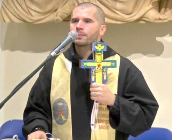 o. Daniel Galus, Górka Przeprośna, Siedlec